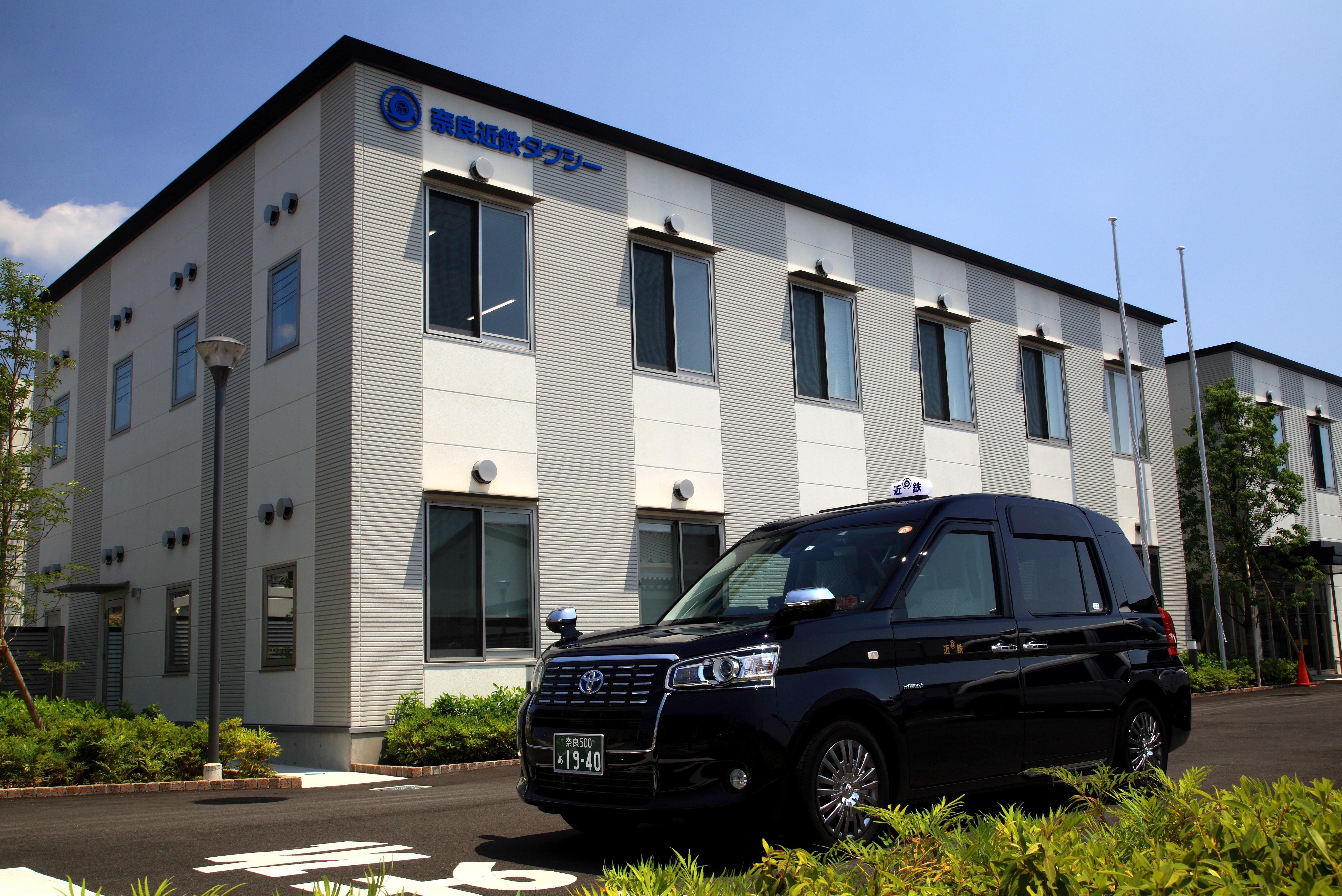 本社および奈良営業所